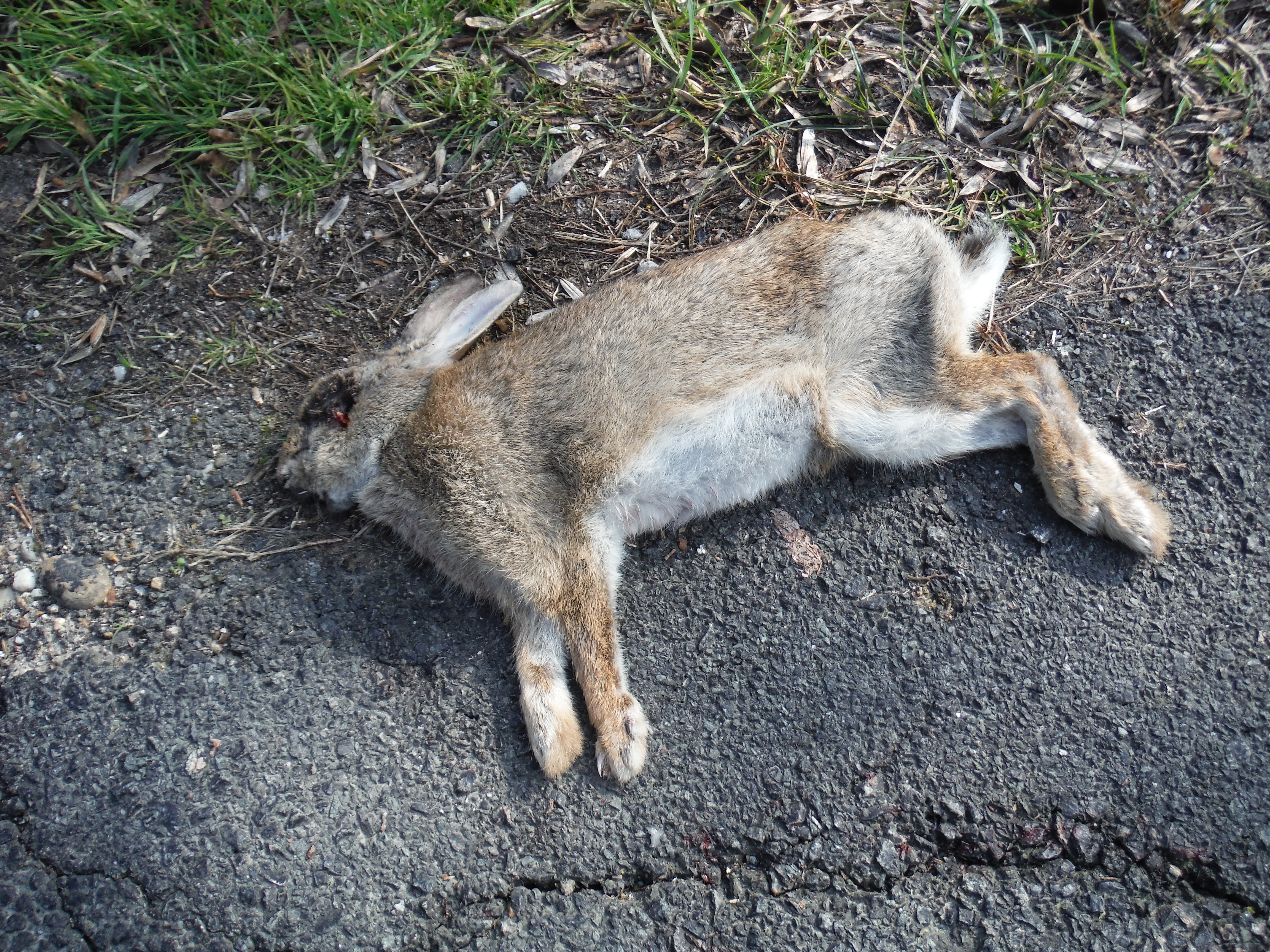 Lapin mort au bord de la route près de Bordeaux en France.